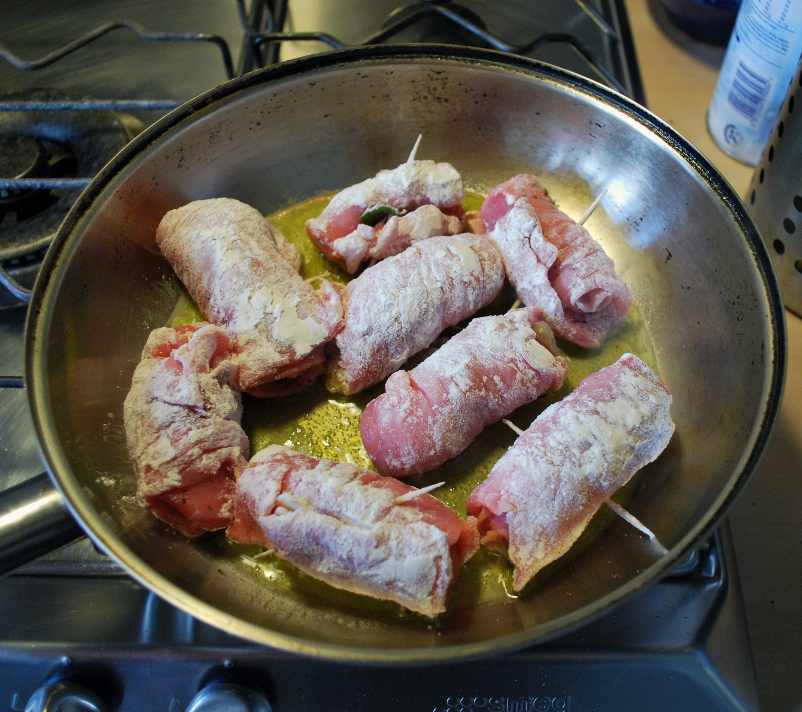 Saltimbocca alla Romana